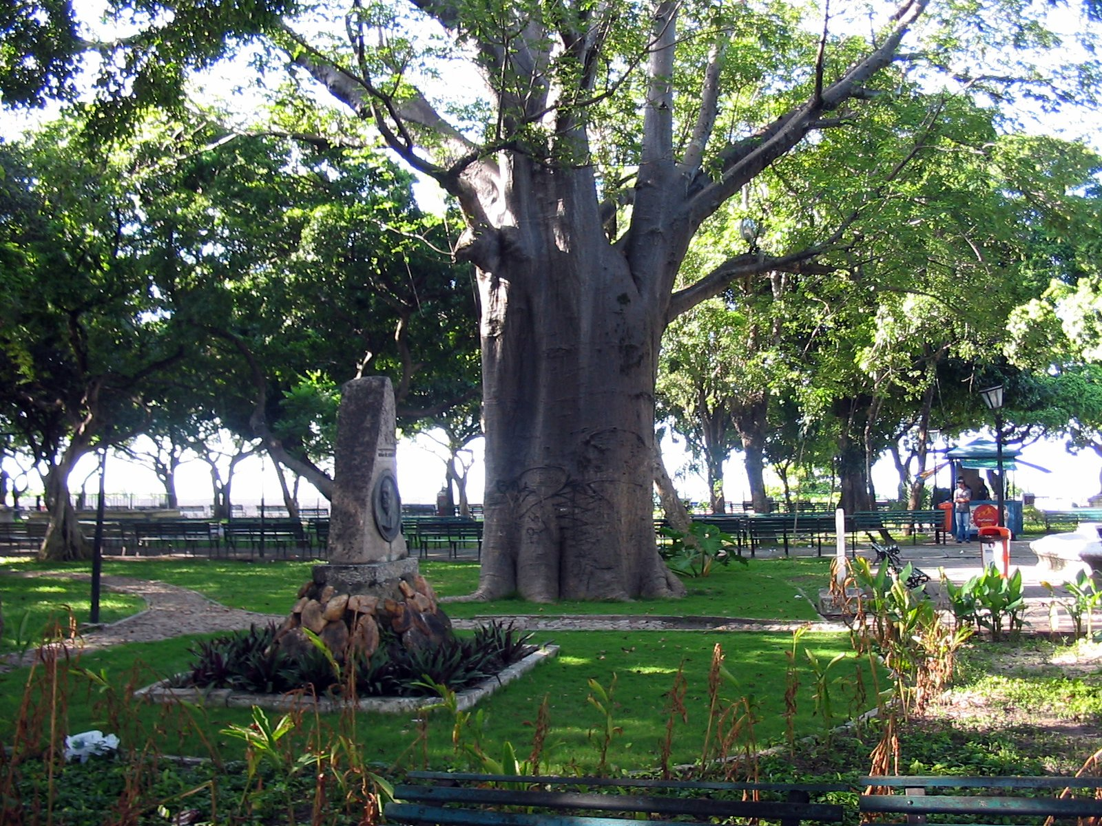 Baoba plantado pelo Senador Pompeu no Passeio Público de Fortaleza - Brasil